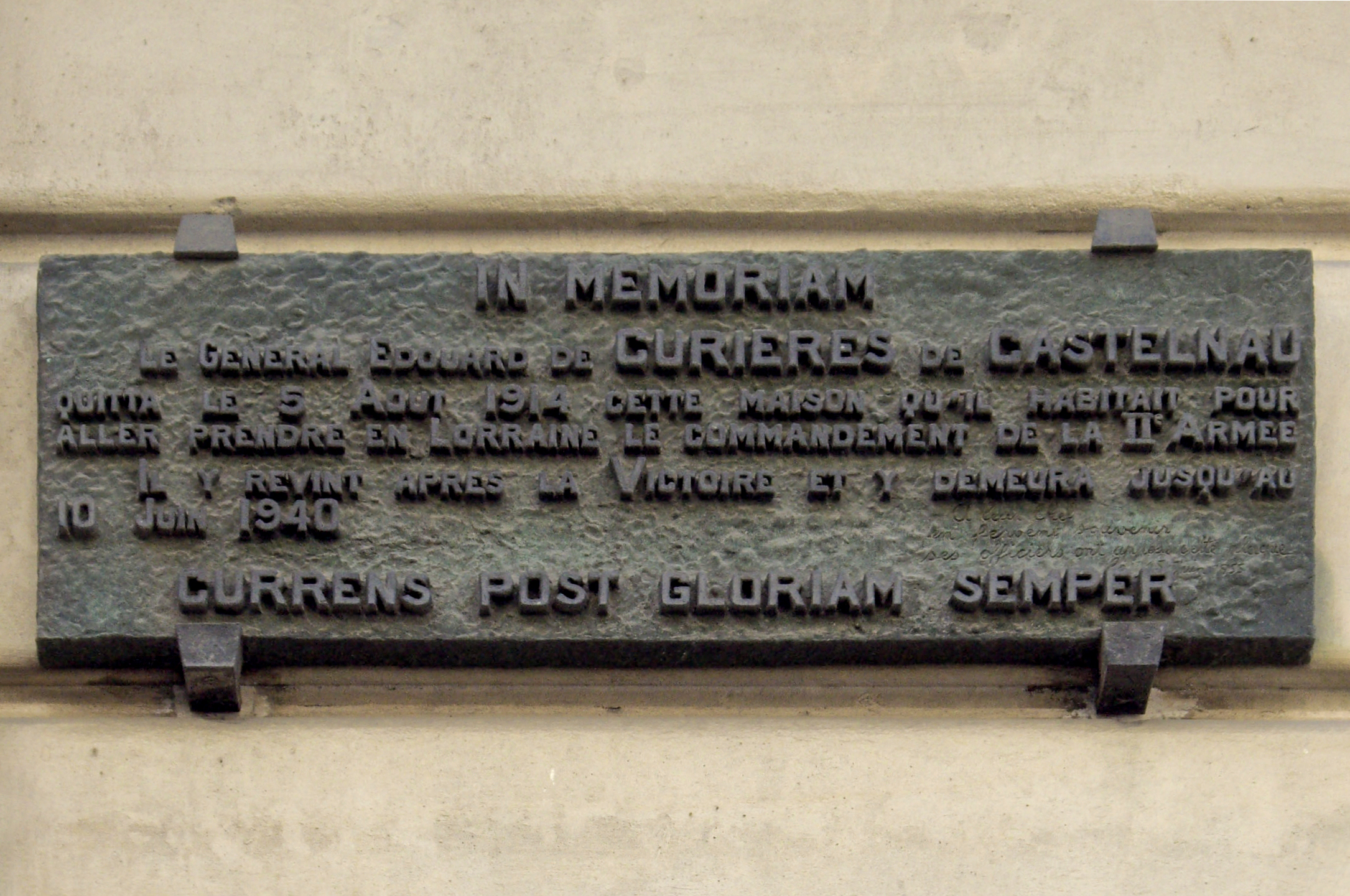 Plaque apposée au n° 42 de l'avenue de La Bourdonnais, Paris 7e.« In memoriam. Le Général Édouard de Curières de Castelnau quitta le 5 août 1914 cette maison qu'il habitait pour aller prendre en Lorraine le commandement de la IIe Armée. Il y revint après la Victoire et y demeura jusqu'au 10 juin 1940. Currens post gloriam semper. »